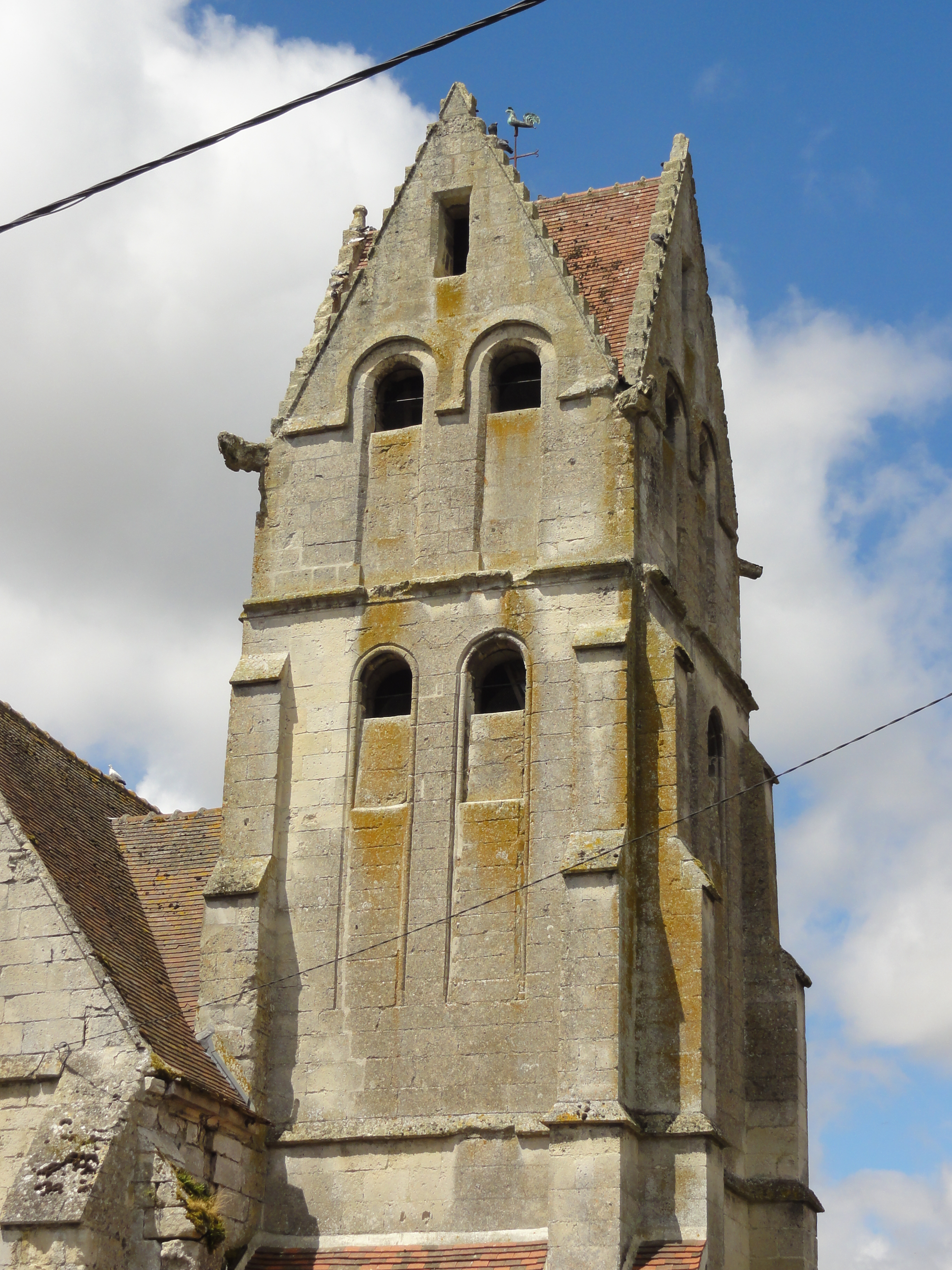 Église Saint-Léger d'Éméville (voir titre).